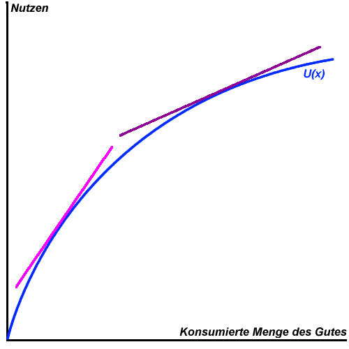 Nutzenfunktion